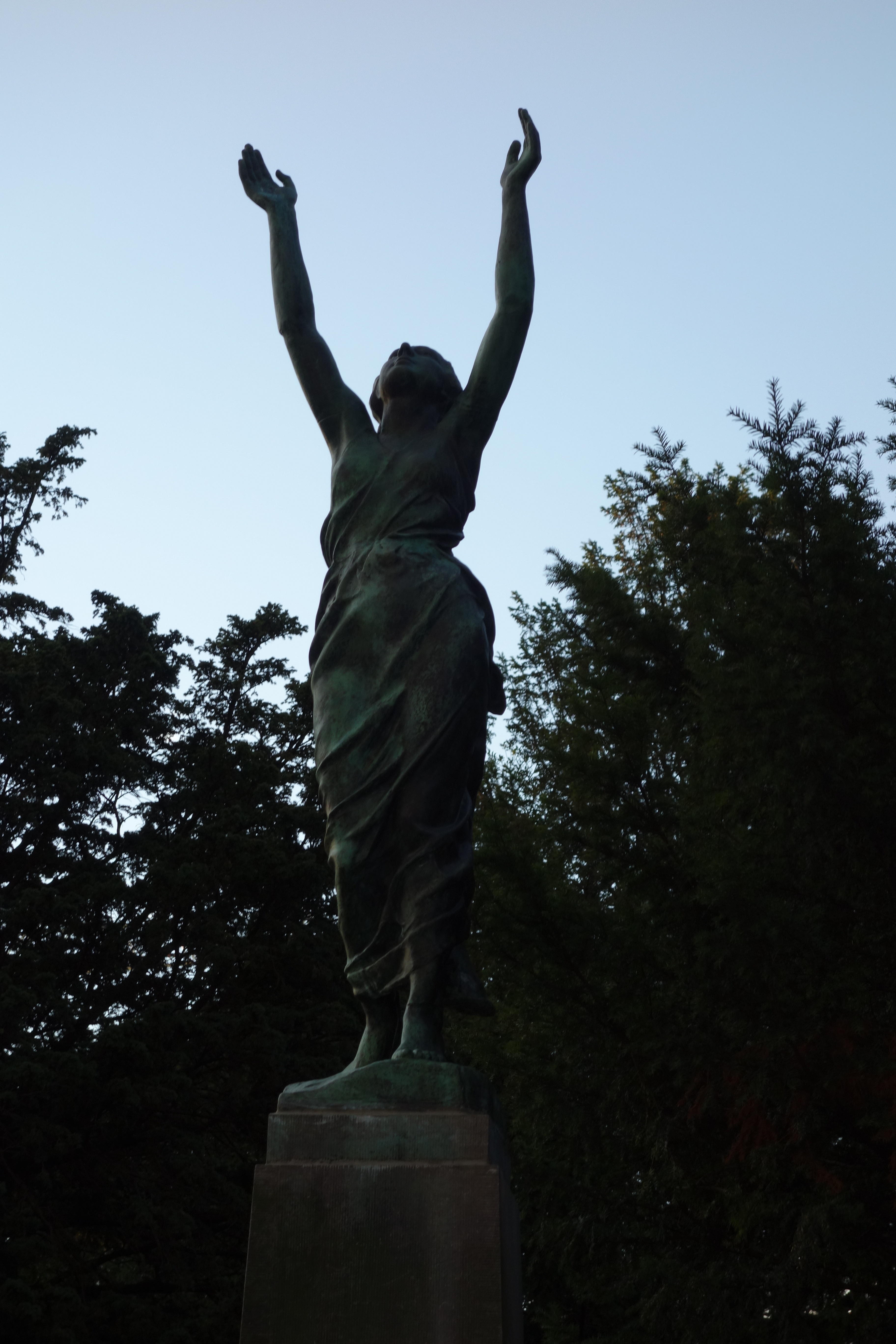 Beeld op het graf van Jules Strauwen: jonge vrouw die een lofzang inzet, het hoofd en de armen geheven. Gesigneerd Ernest Salu.